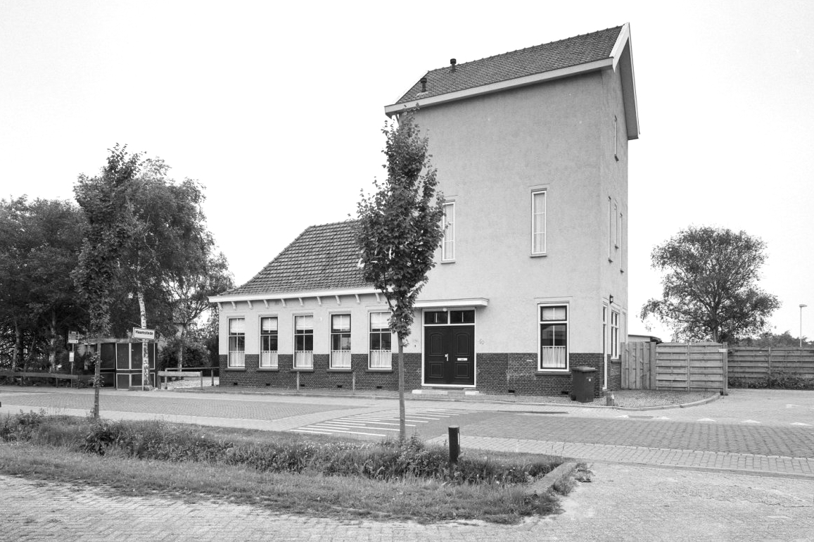 Tramstation/ Station: Overzicht voorgevel en rechter zijgevel, voormalig tramstation (opmerking: Gefotografeerd voor Monumenten In Nederland Zeeland, bladzijde 88)